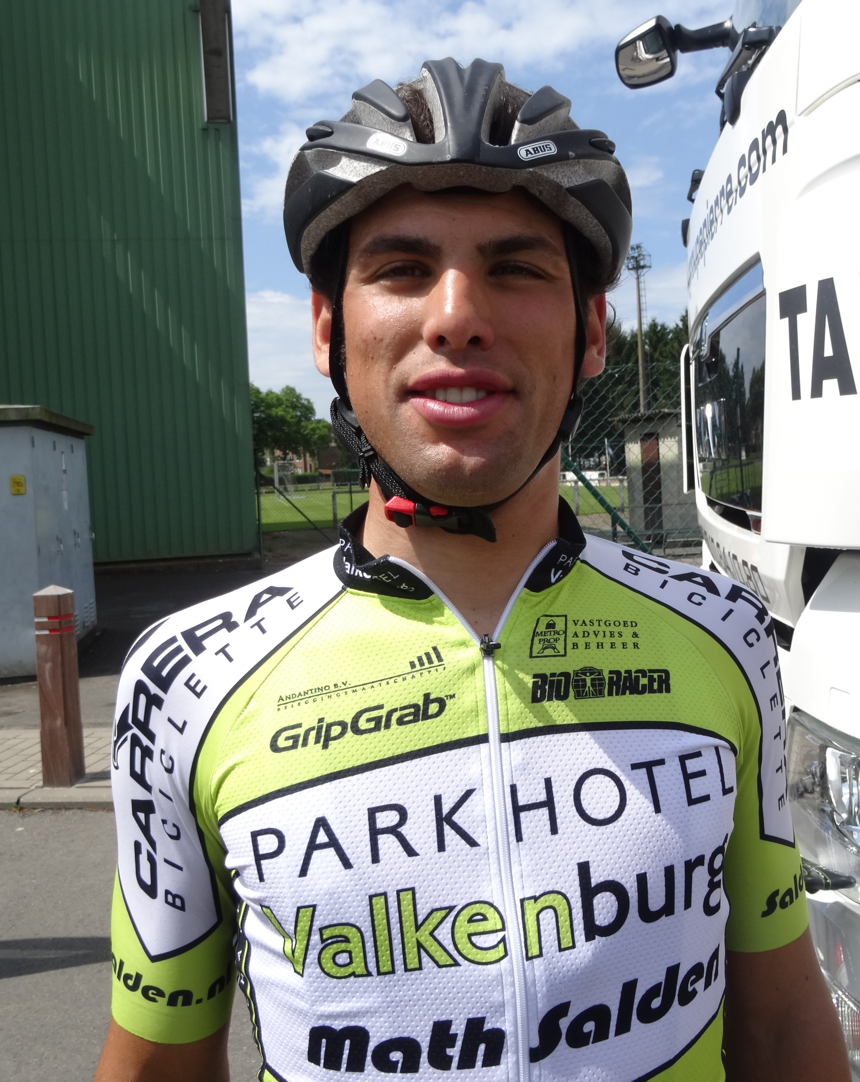 Reportage réalisé le dimanche 8 juin à l'occasion du départ du Mémorial Philippe Van Coningsloo 2014 à Wavre, Belgique.